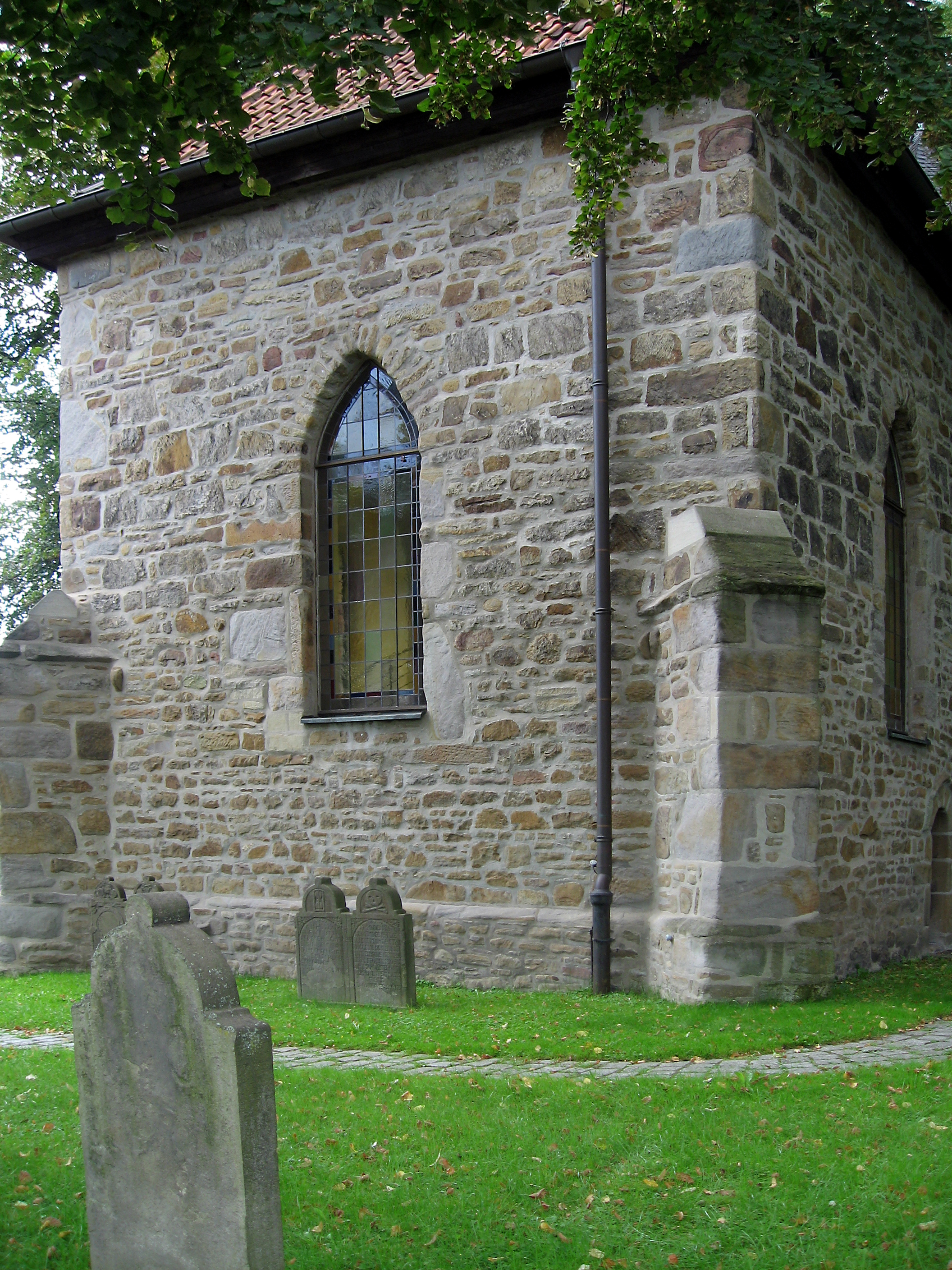 Dortmund, Klein-Barop, Margarethenkapelle, Grabsteine an der Westwand des Chores; evangelisch, Chor 13. Jh., Langhaus 1829 neu errichtet, ursprünglich Filiale von St. Reinoldi